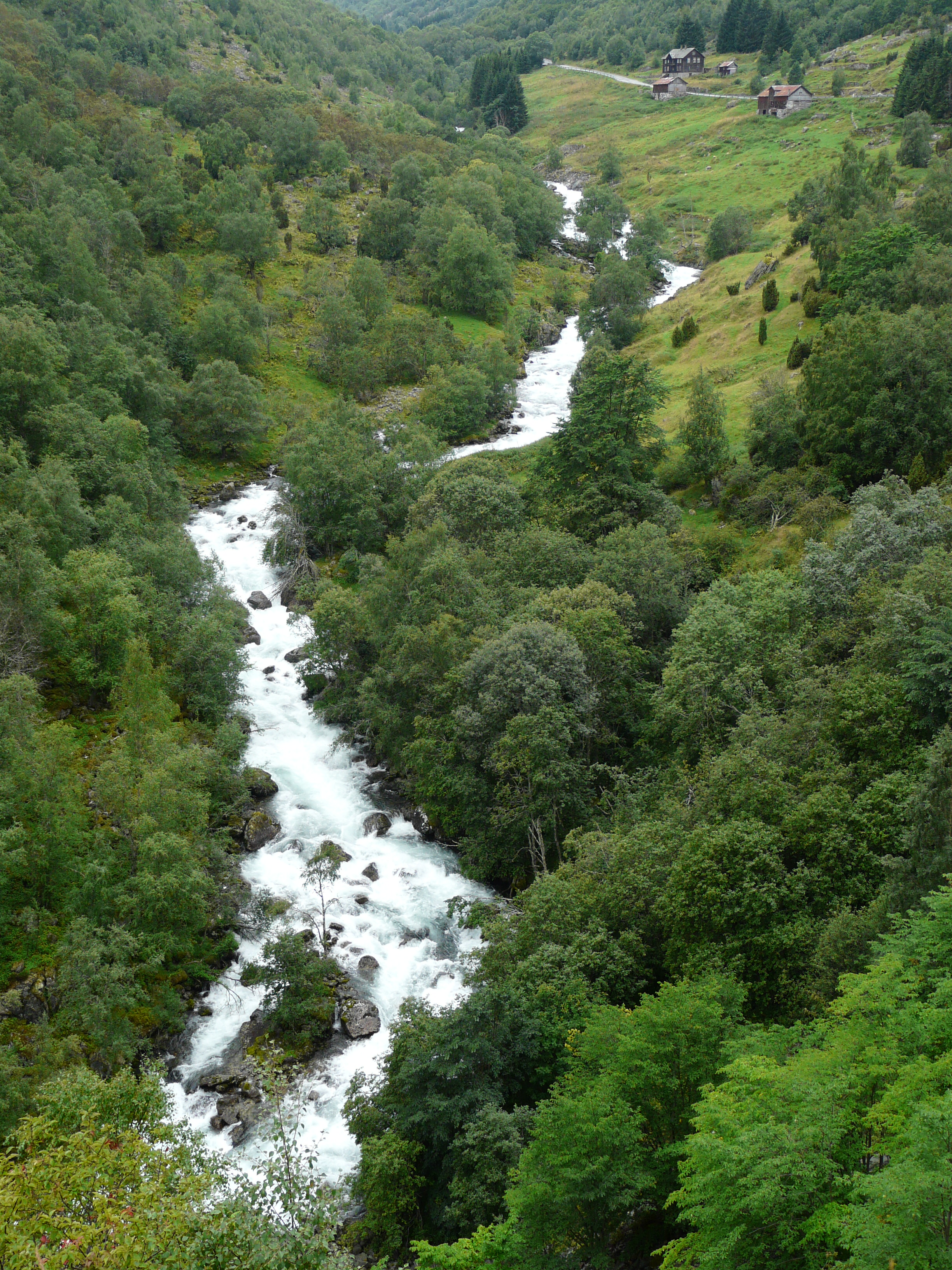 Waterval langs de sneeuwweg, RV 243, tussen Laerdal en Aurland